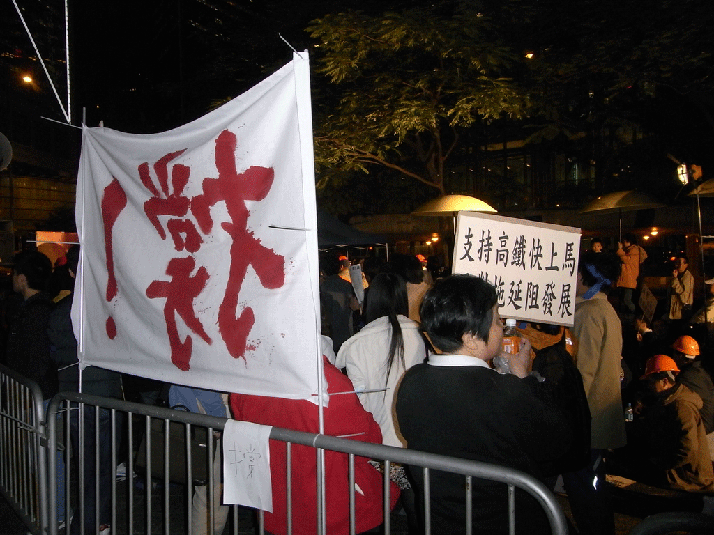 中文（香港）: 香港人撐高鐵運動